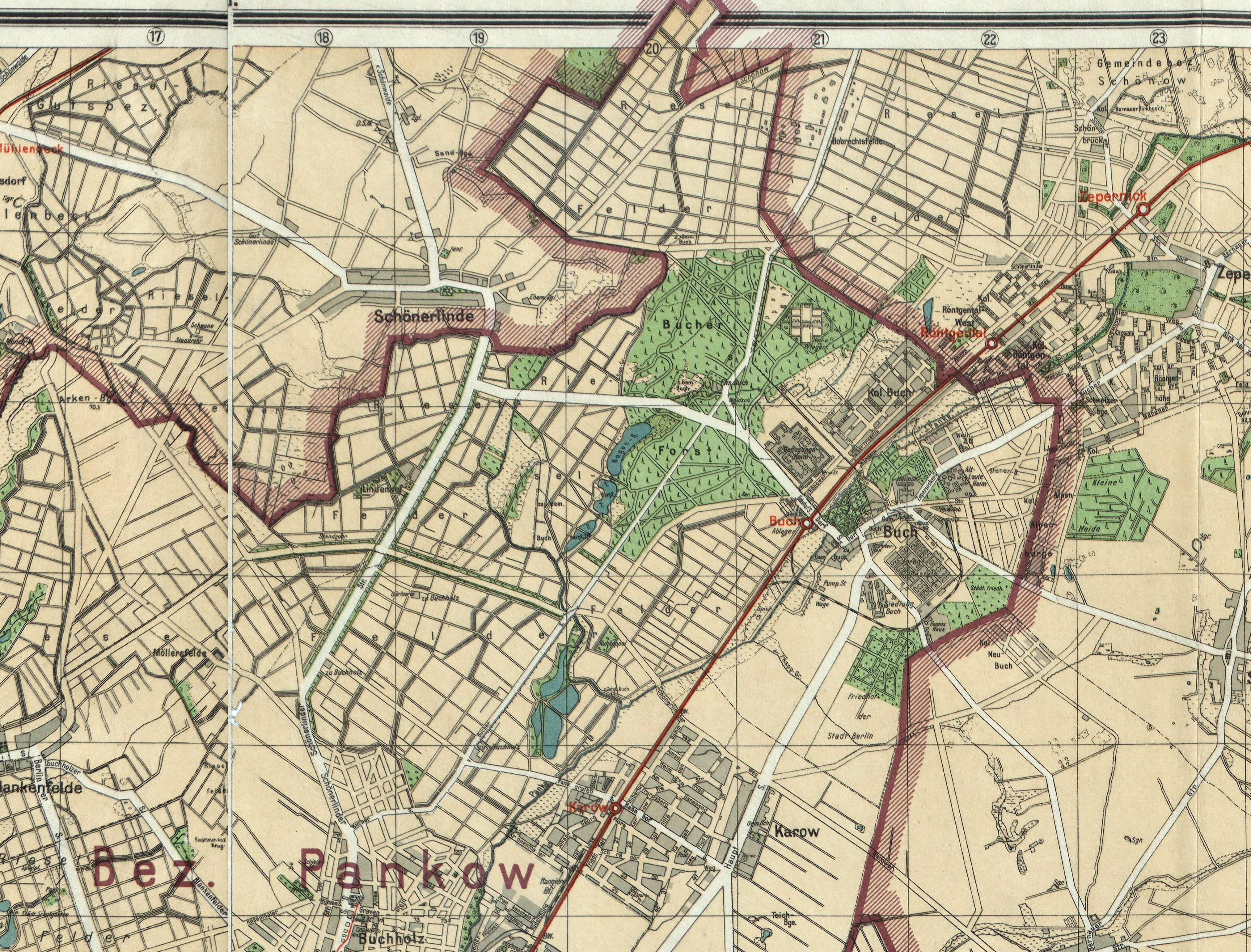 Silva-Übersichtsplan von der Stadt Berlin und ihren 20 Verwaltungsbezirken : auf Grund des Gesetzes vom 27. April 1920 / bearb. und hrsg. von Willy Holz * Format: ca 163 x 117 cm * Orientierung: Nord * Maßstab: 1: 30 000 (Innenstadt 1: 20 000) * 2 Blätter, mehrfarbig